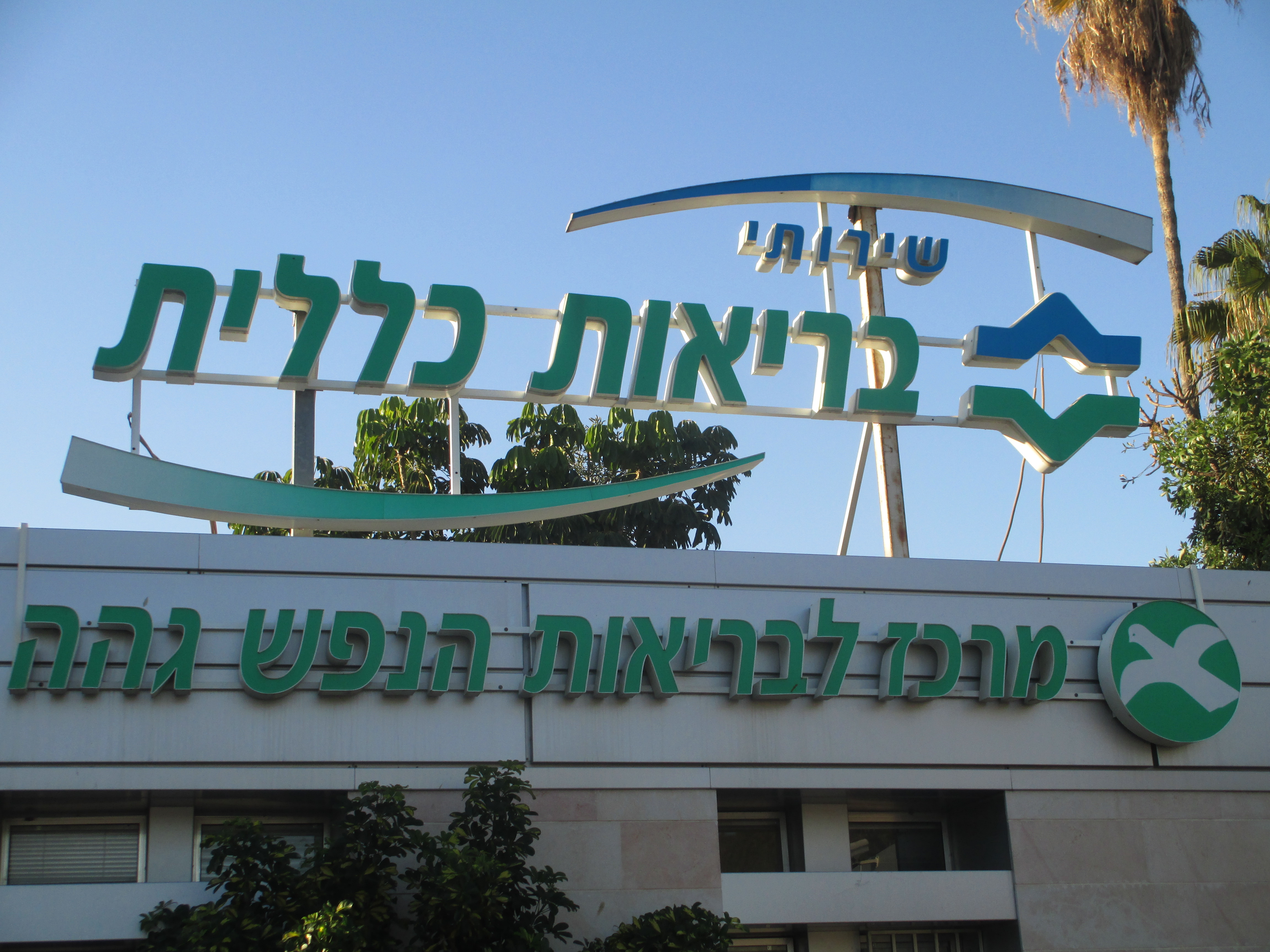 מרכז לבריאות הנפש גהה בפתח תקווה